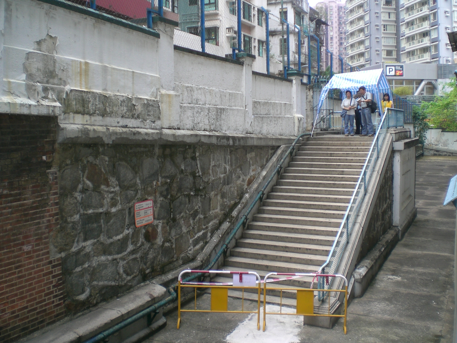 前荷李活道警察宿舍開放日 於2008年3月尾, organised by 古物古蹟辦事處